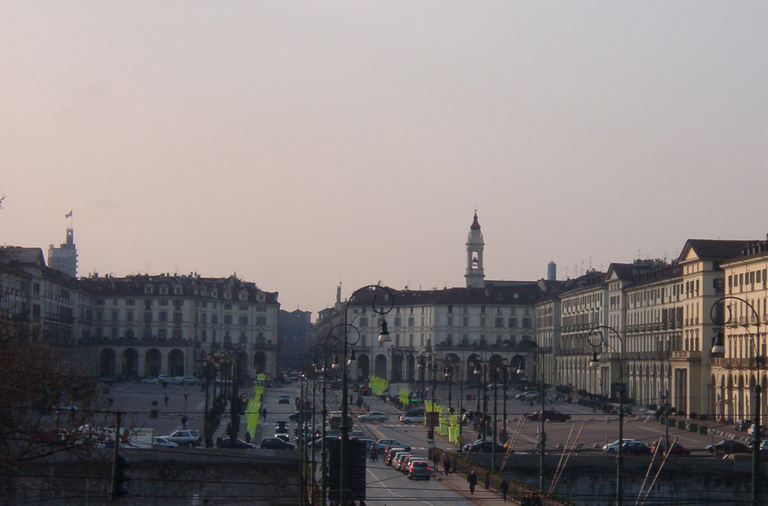 Piazza Vittorio Veneto - Torino - Italia